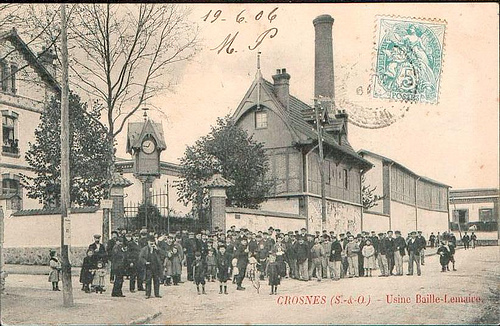 Usine Baille-Lemaine (Crosne, Seine-et-Oise) : entrée principale.